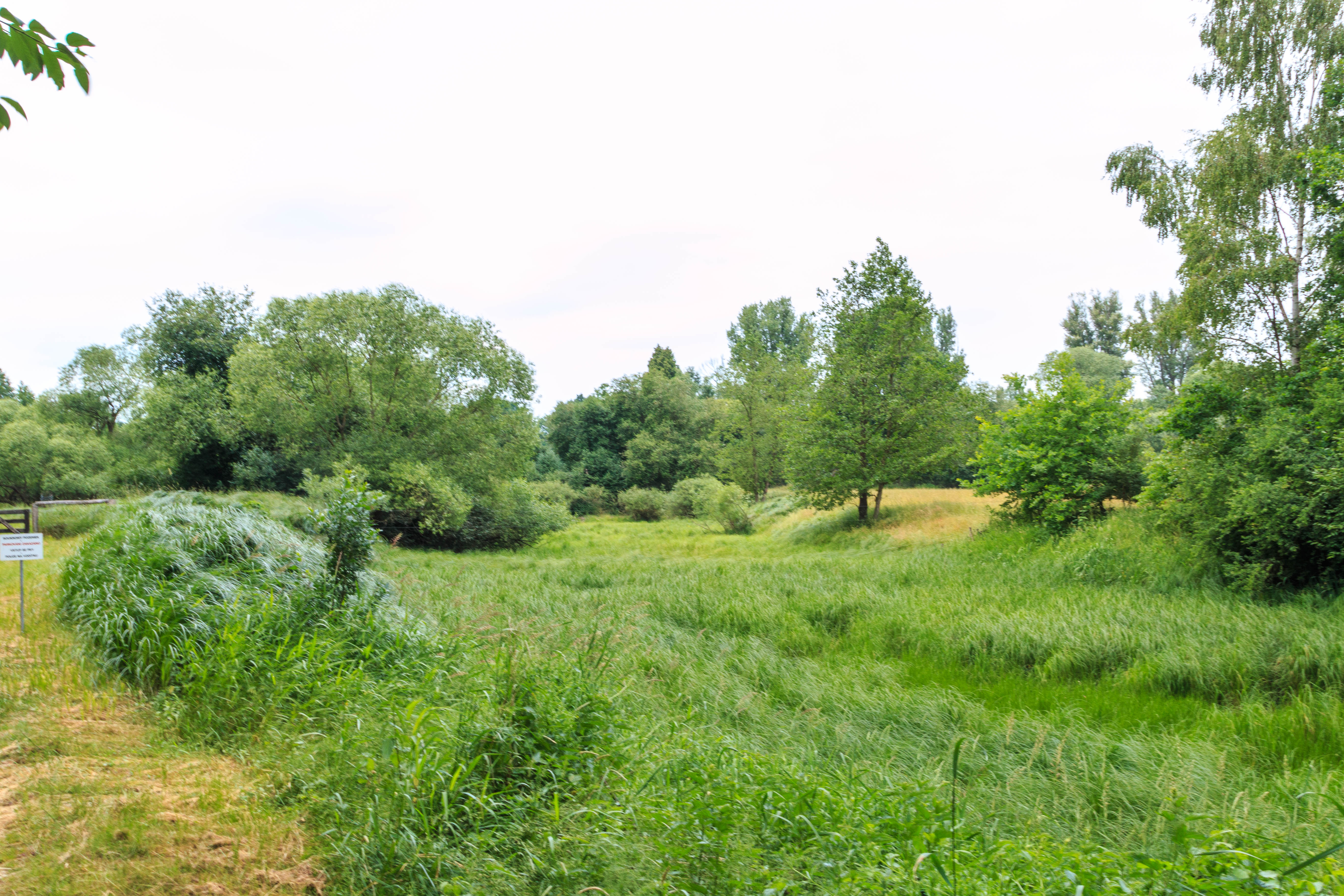 PP Orlice Project: Chráněná území.